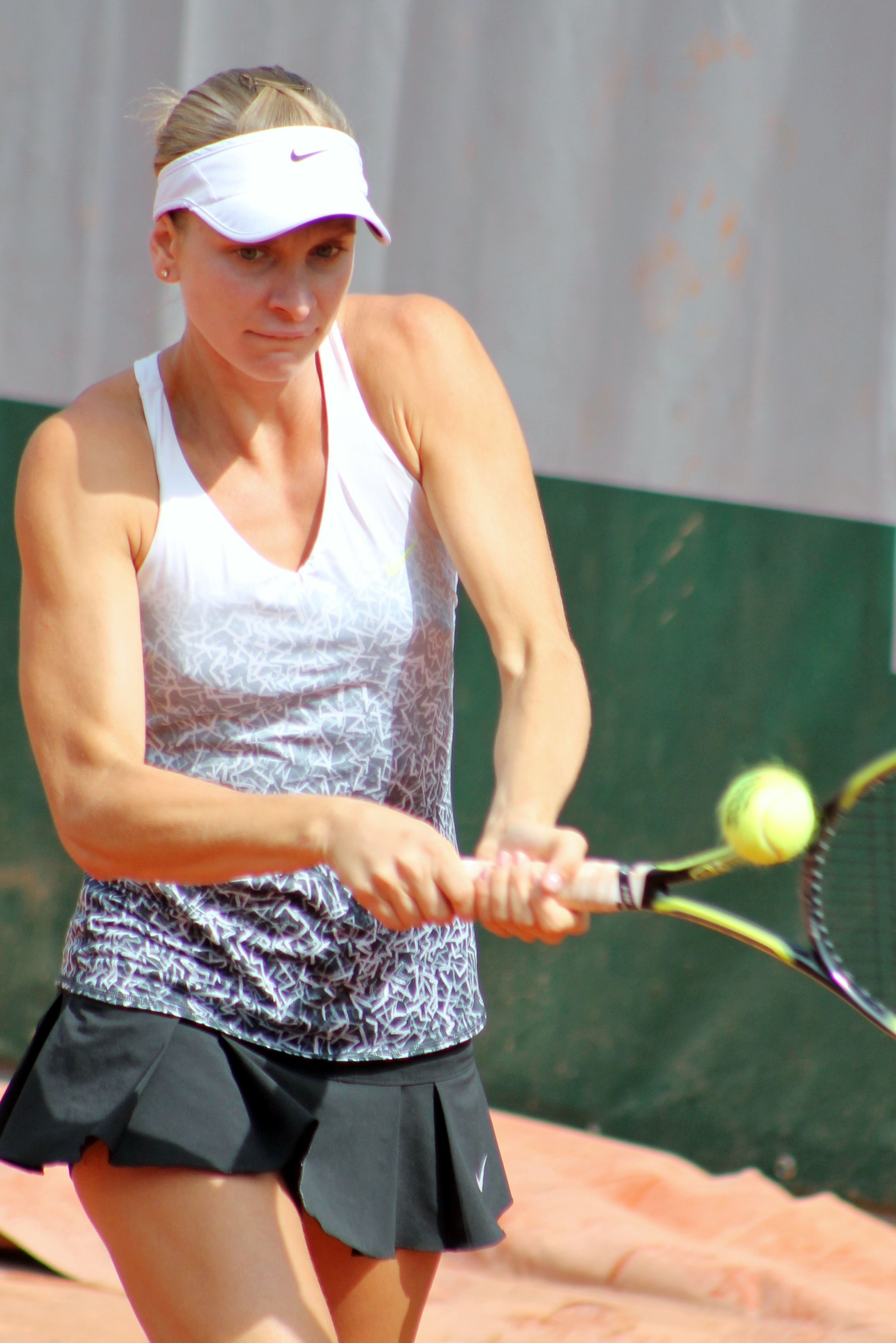 Karatantcheva RG15 (8)